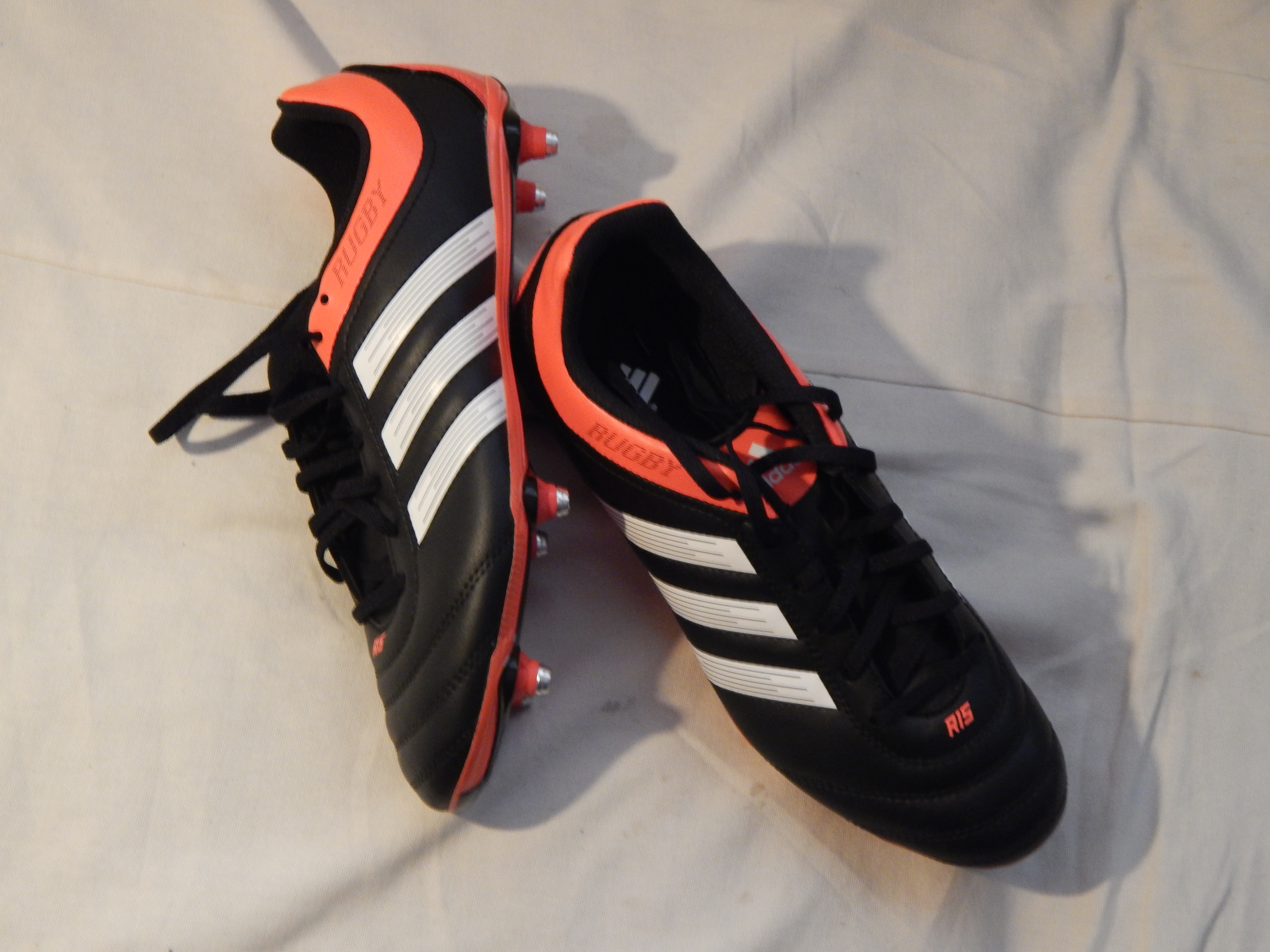 Rugby Adidas R15 TRX SG.